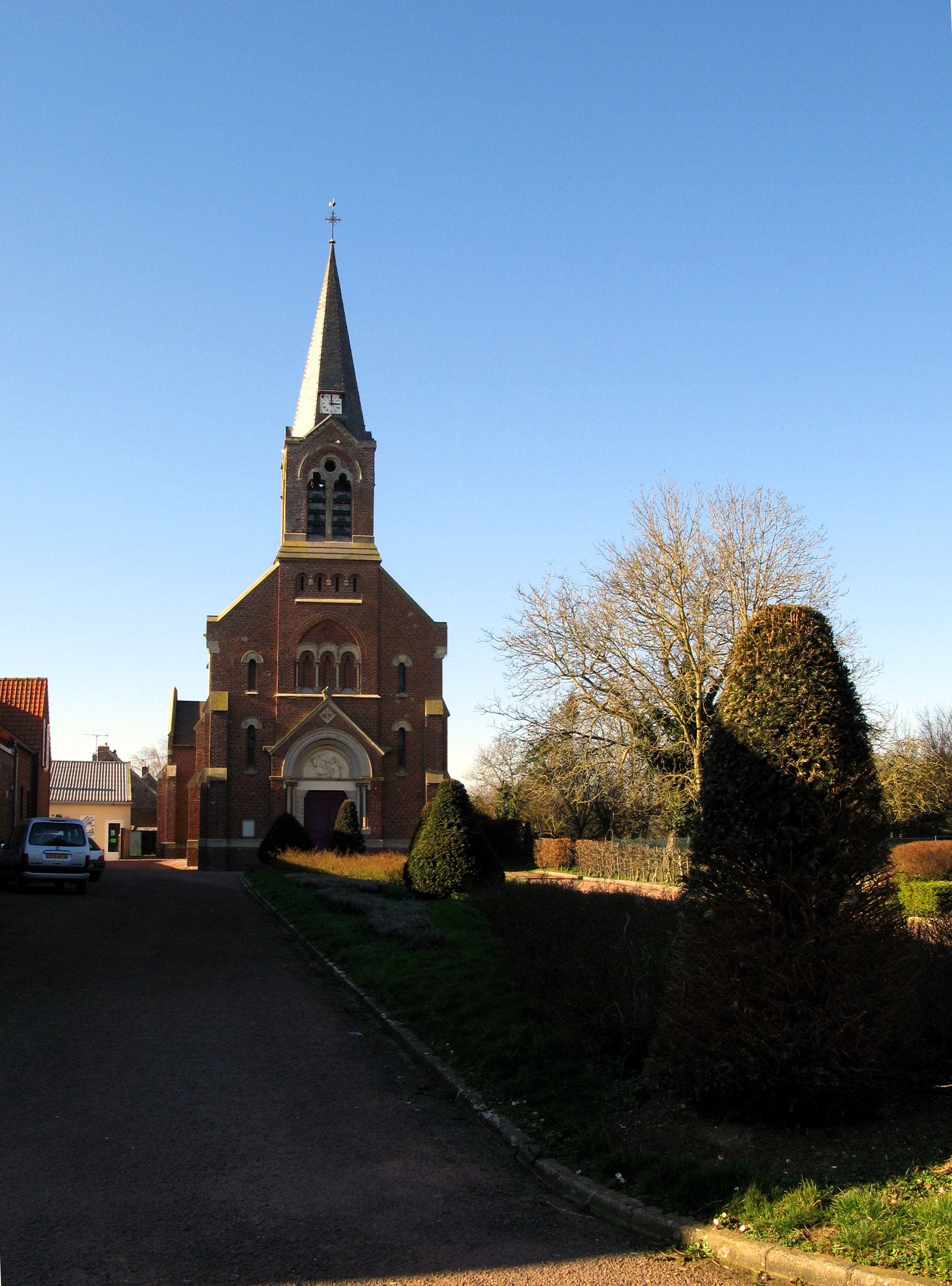 Rouvrel (Somme, France) - L'église. . .